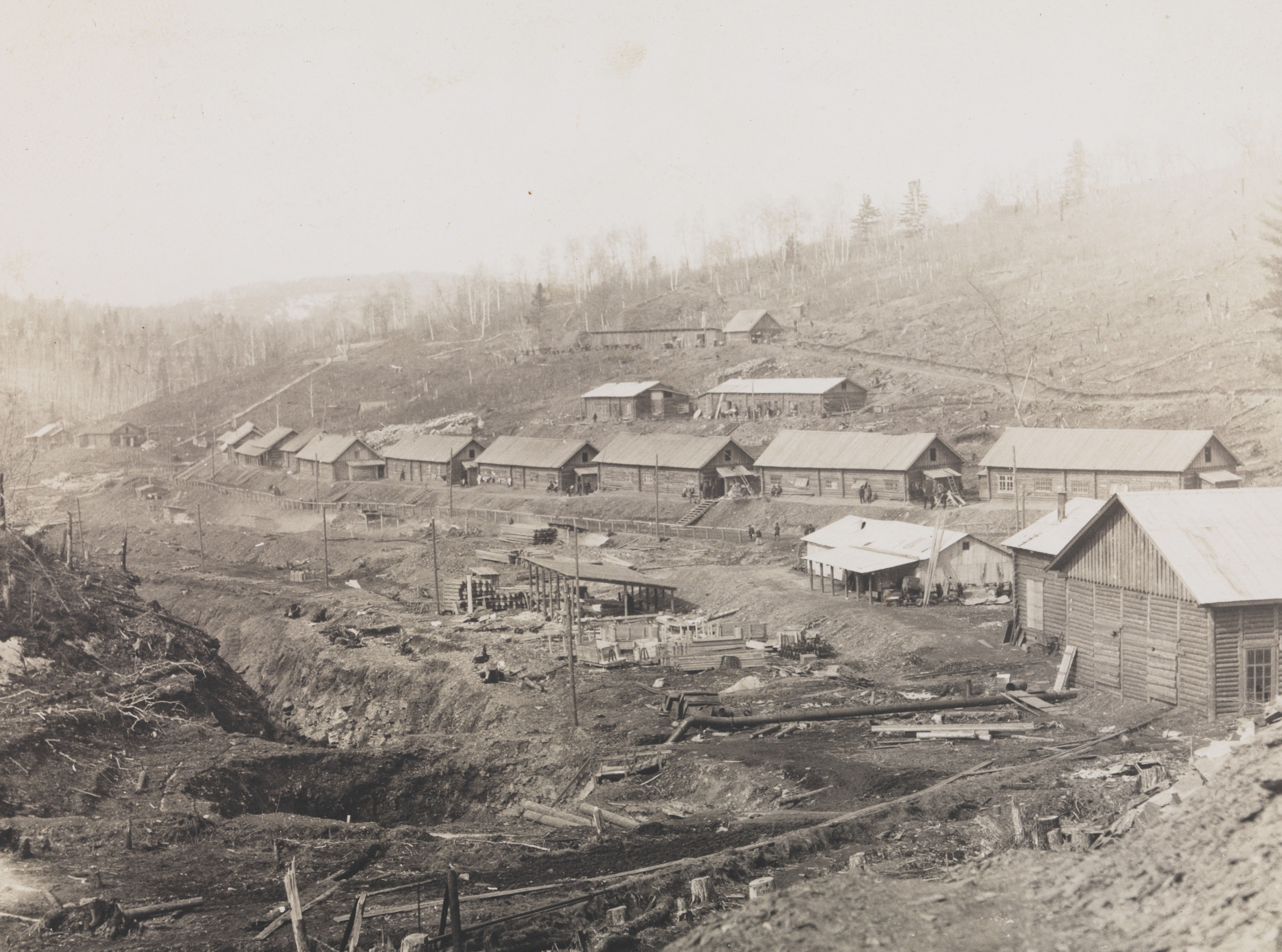 Arbeiderbrakker ved Amurbanetunnelens østende. Ett av bildene fra reisen til Sibir i perioden 2. august - 26. oktober 1913. Fridtjof Nansen fortsatte sin transsibirske reise med den delvis nye jernbanen fra Krasnojarsk helt til Vladivostok. Depicted place: Russland, Bira